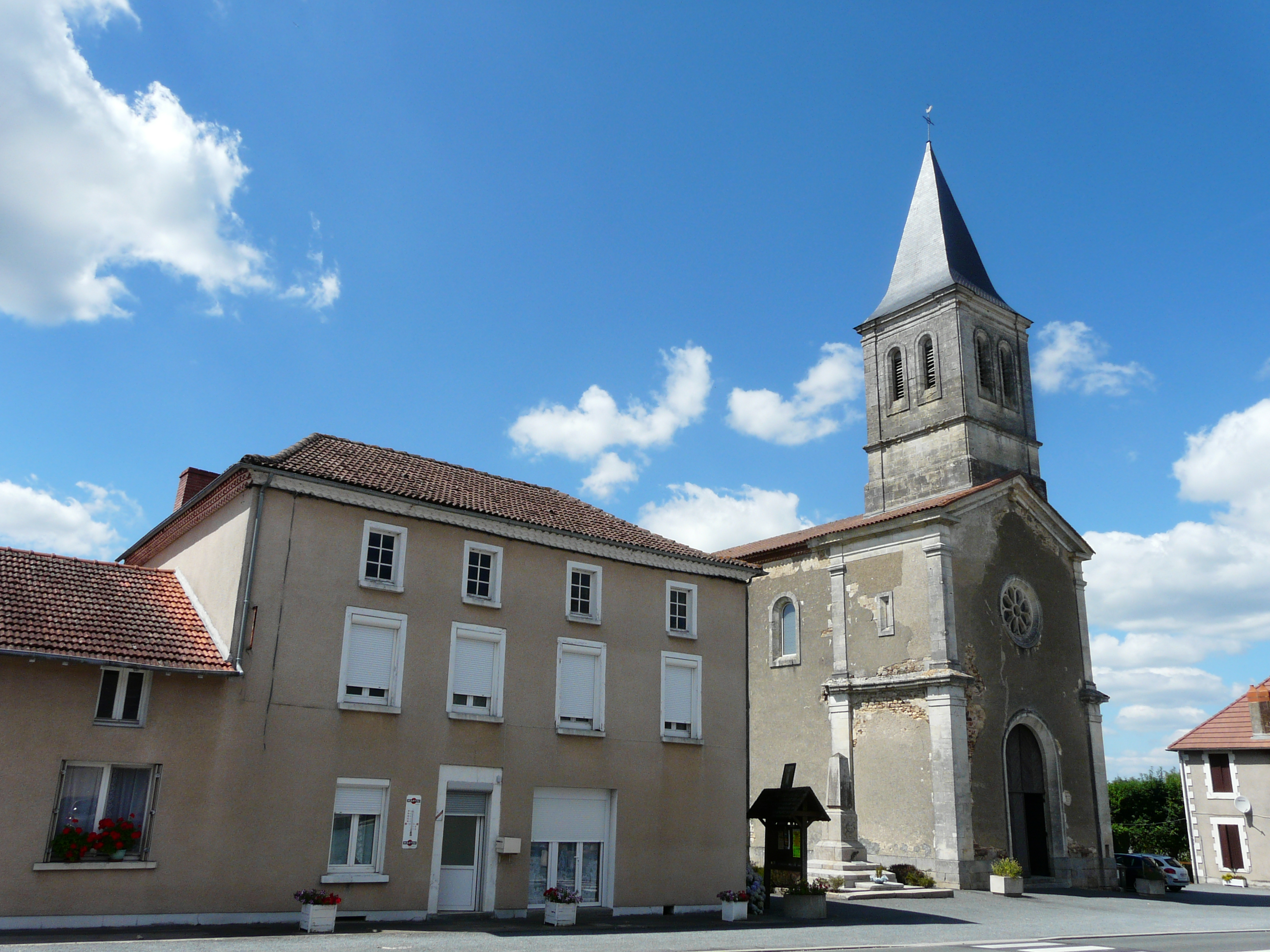 L'église Saint-Étienne vue du sud-est, Firbeix, Dordogne, France.